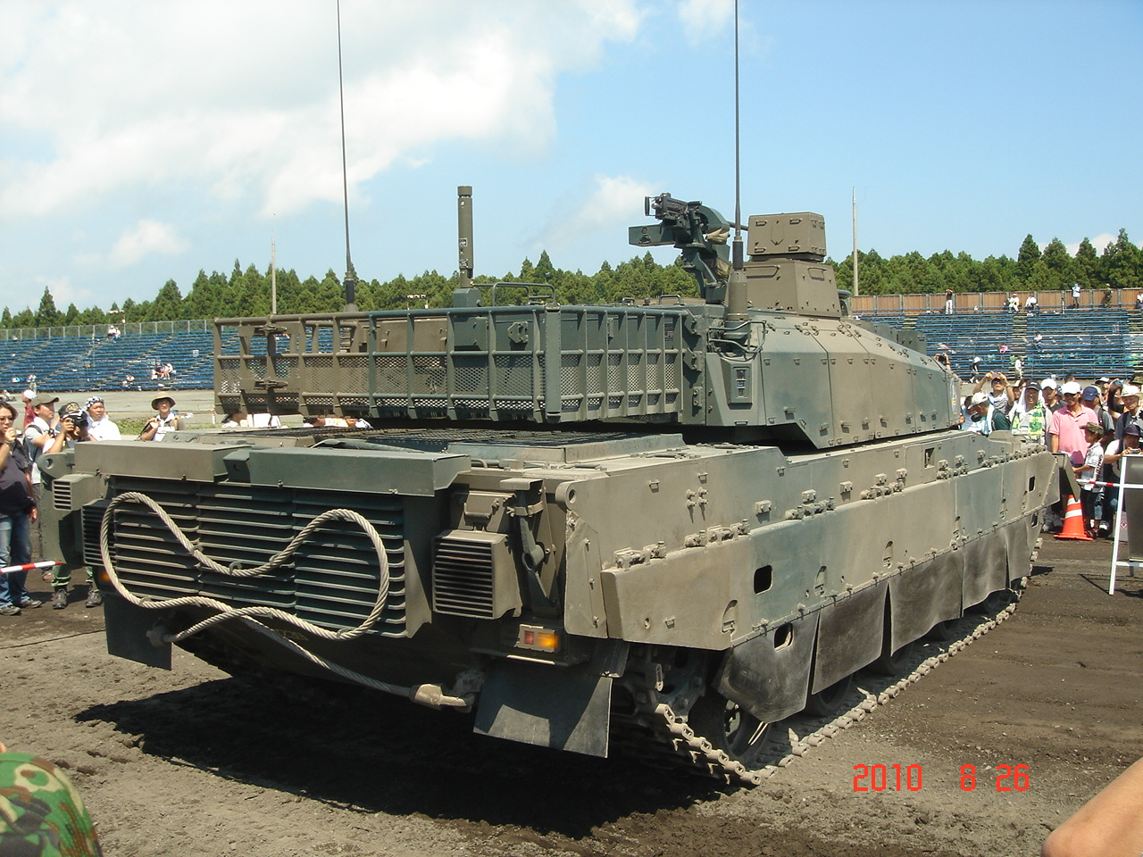 10式戦車を後方から見る。平成22年度富士総合火力演習予行の装備品展示にて。